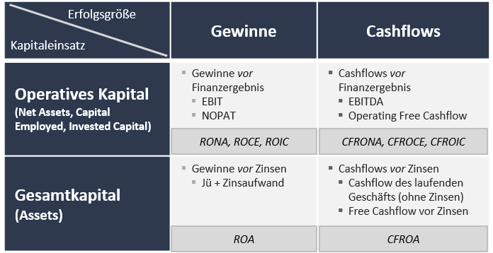 Kapitalrenditen